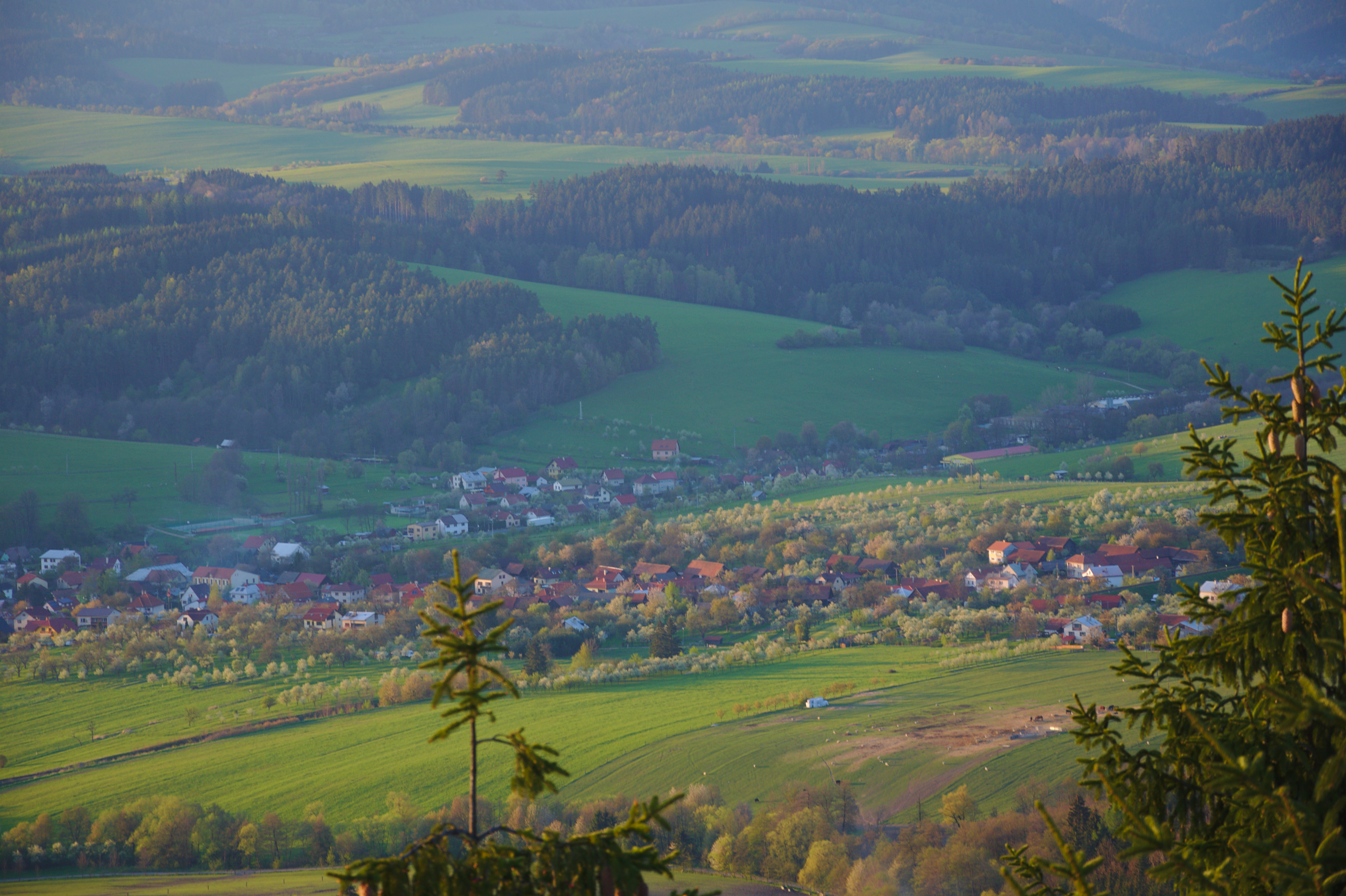 Poteč při západu slunce z rozhledny Královec, okres Zlín